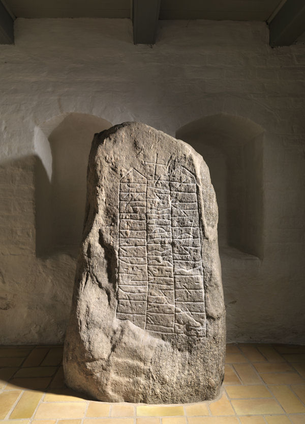 Foto: Nationalmuseet ved Roberto Fortuna